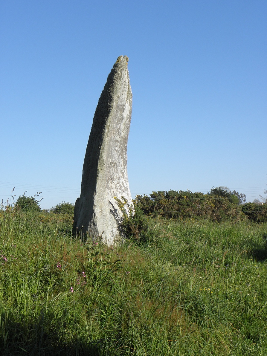 Menhir de Couinandré sis à Plouescat (29).